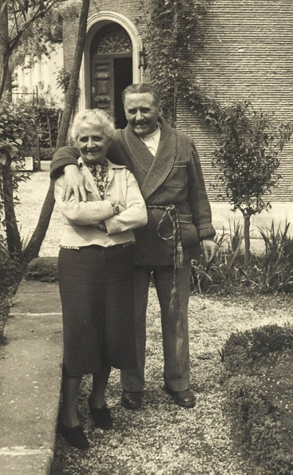 Adele Albieri con il fratello Gino